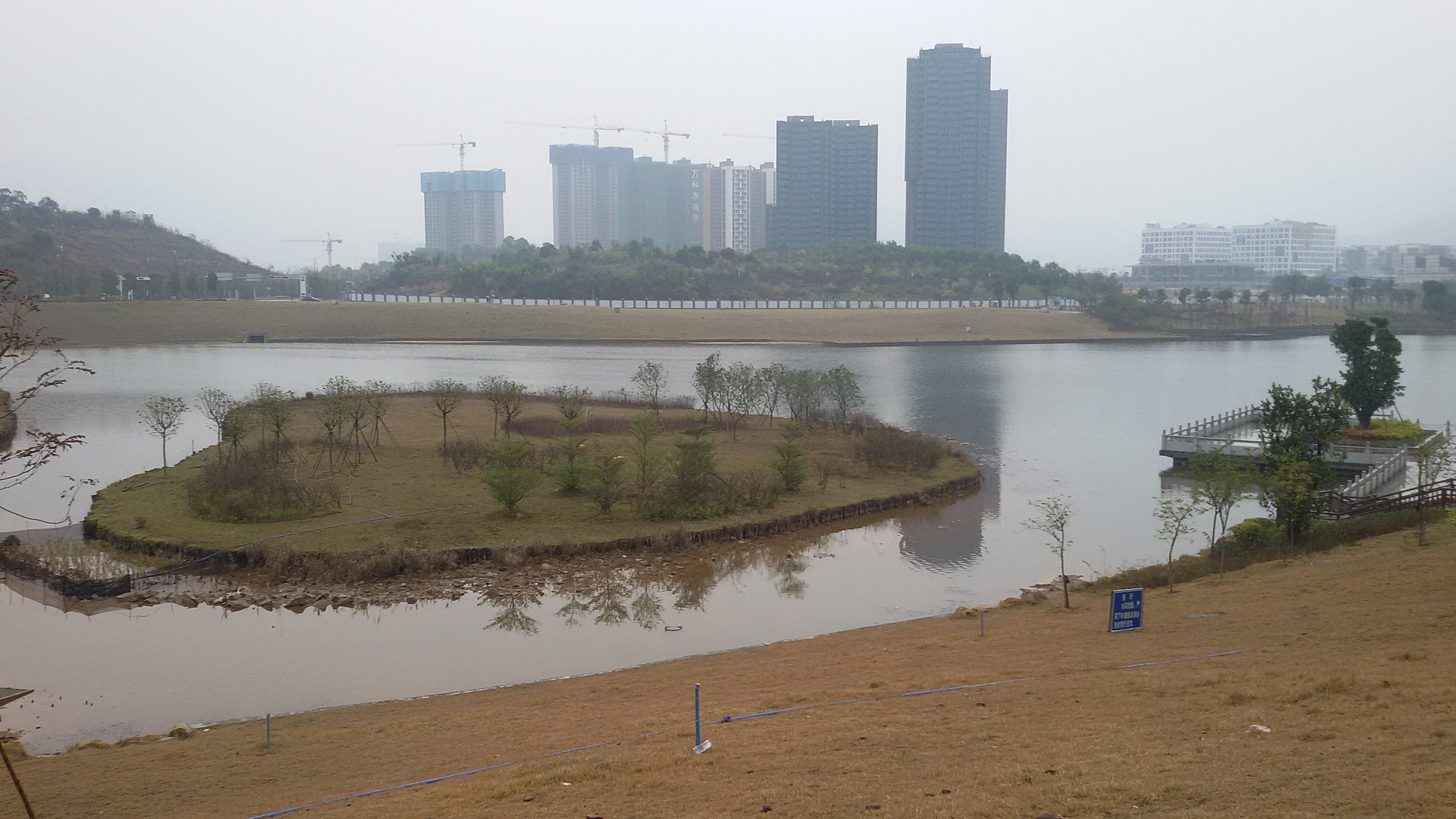 粵語: 廣州嘅鳳凰湖